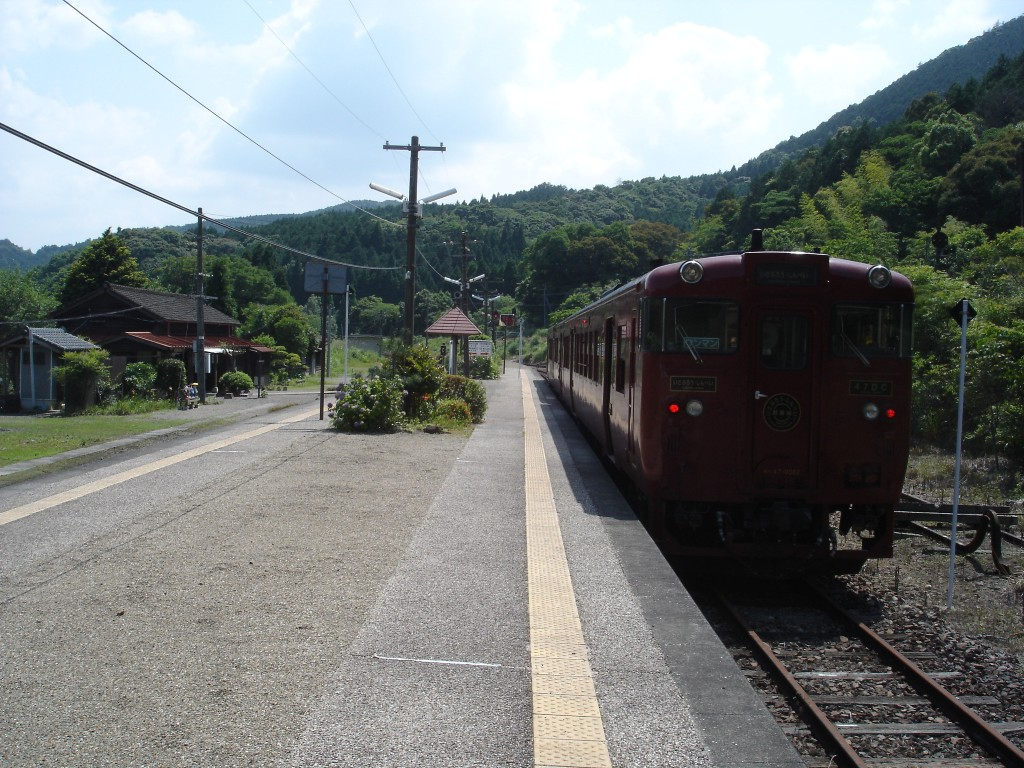 真幸驛月台，「伊三郎／新平號」列車即將折返離站。